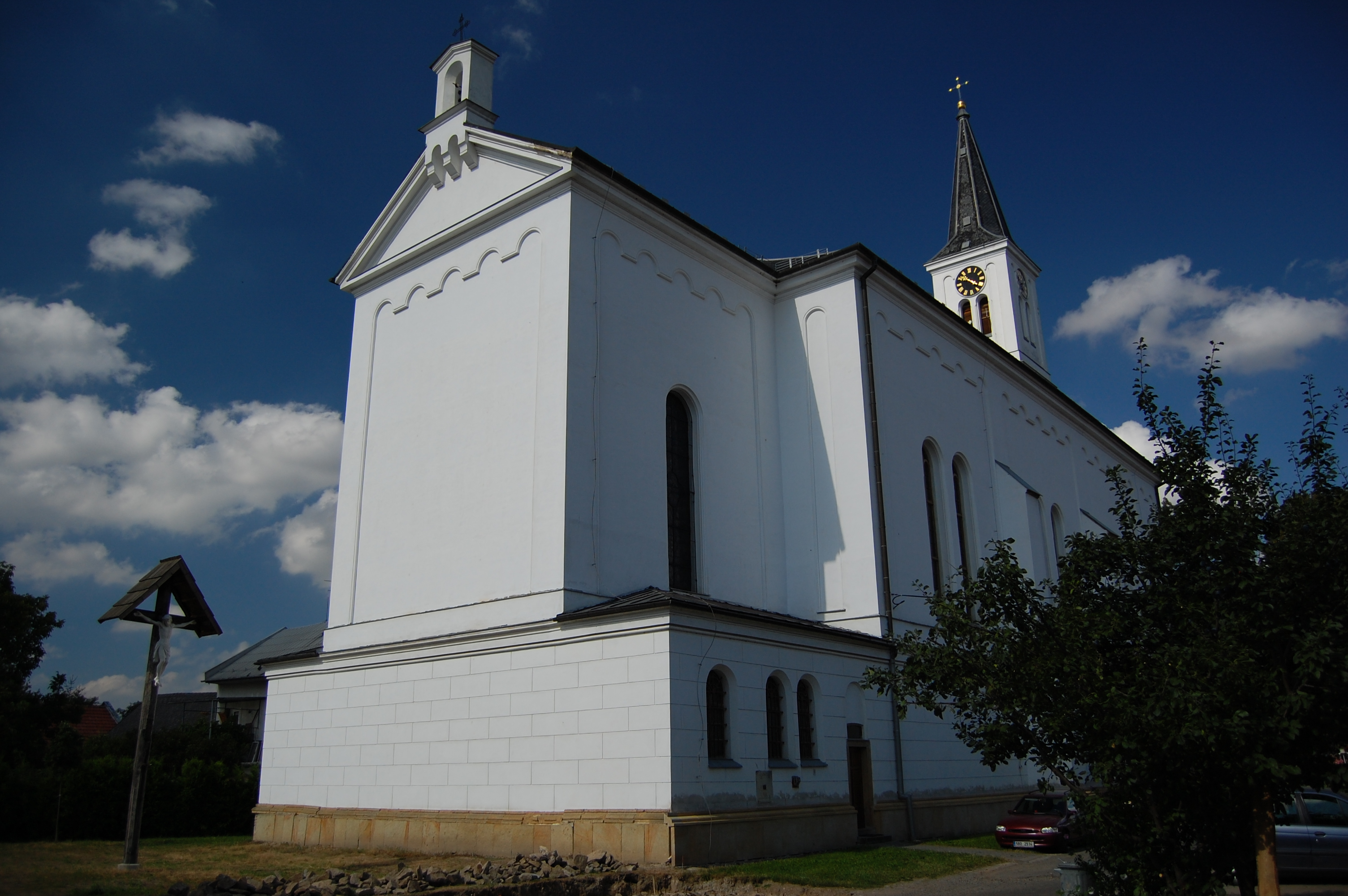 Kostel svatého Petra a Pavla - pohled z boku, Smržice, okres Prostějov